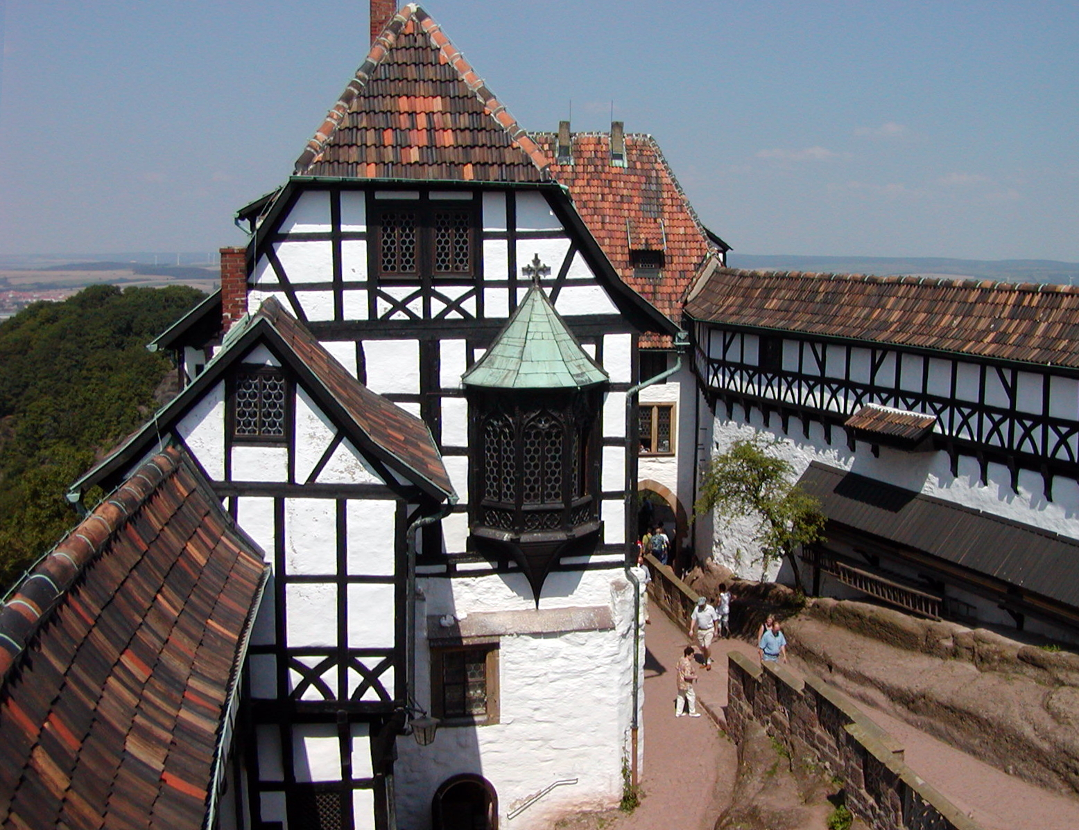 Burghof der Wartburg (heute), rechts der Elisabethengang